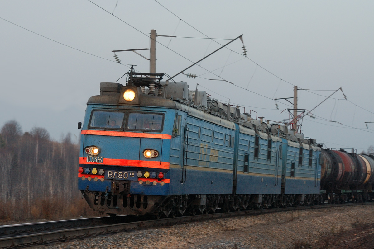 Электровоз ВЛ80ТК-1036 с грузовым поездом на перегоне Каштан - Итат, Красноярская ЖД